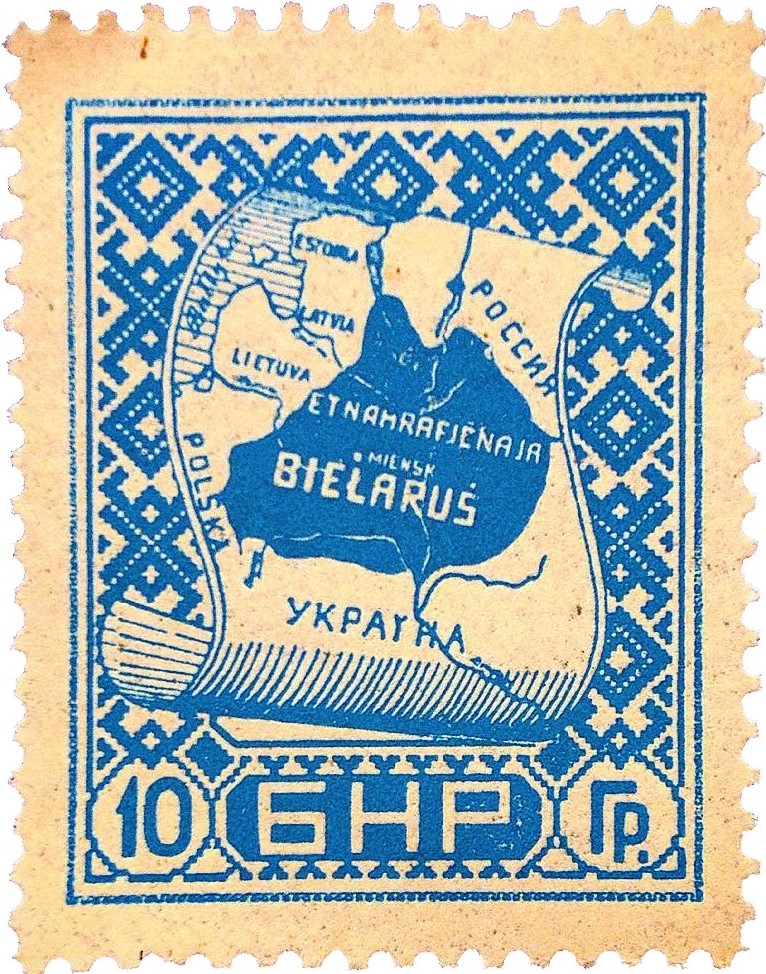 Беларуская (тарашкевіца): Марка Беларускай Народнай Рэспублікі (10 грашоў)